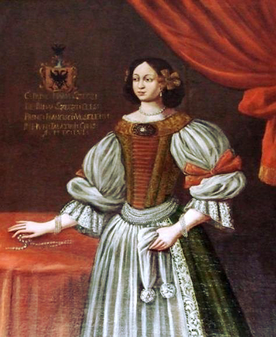 Gróf rimaszécsi Széchy Mária (Balogvár, 1610 – Kőszeg, 1679. július 18.), magyar főúrnő, „Murányi Vénusz” néven vált ismertté. Egykorú festmény a herczeg Eszterháziak fraknói várkastélyában. Felirata: COMIT(issa) MARIA SZECZI DE RIMA: SZECZI: CELS(issimi): PRINC(ipis): FRANCISCI: VESELENI: R(egni): HUN(gariae): PALATINI: CONS(ors): A(nno): M: Dc: LVI. (Mühlbeck K. rajza.) Szilágyi Sándor: A Magy. Nemz. Tört., VII. k. 269. l.